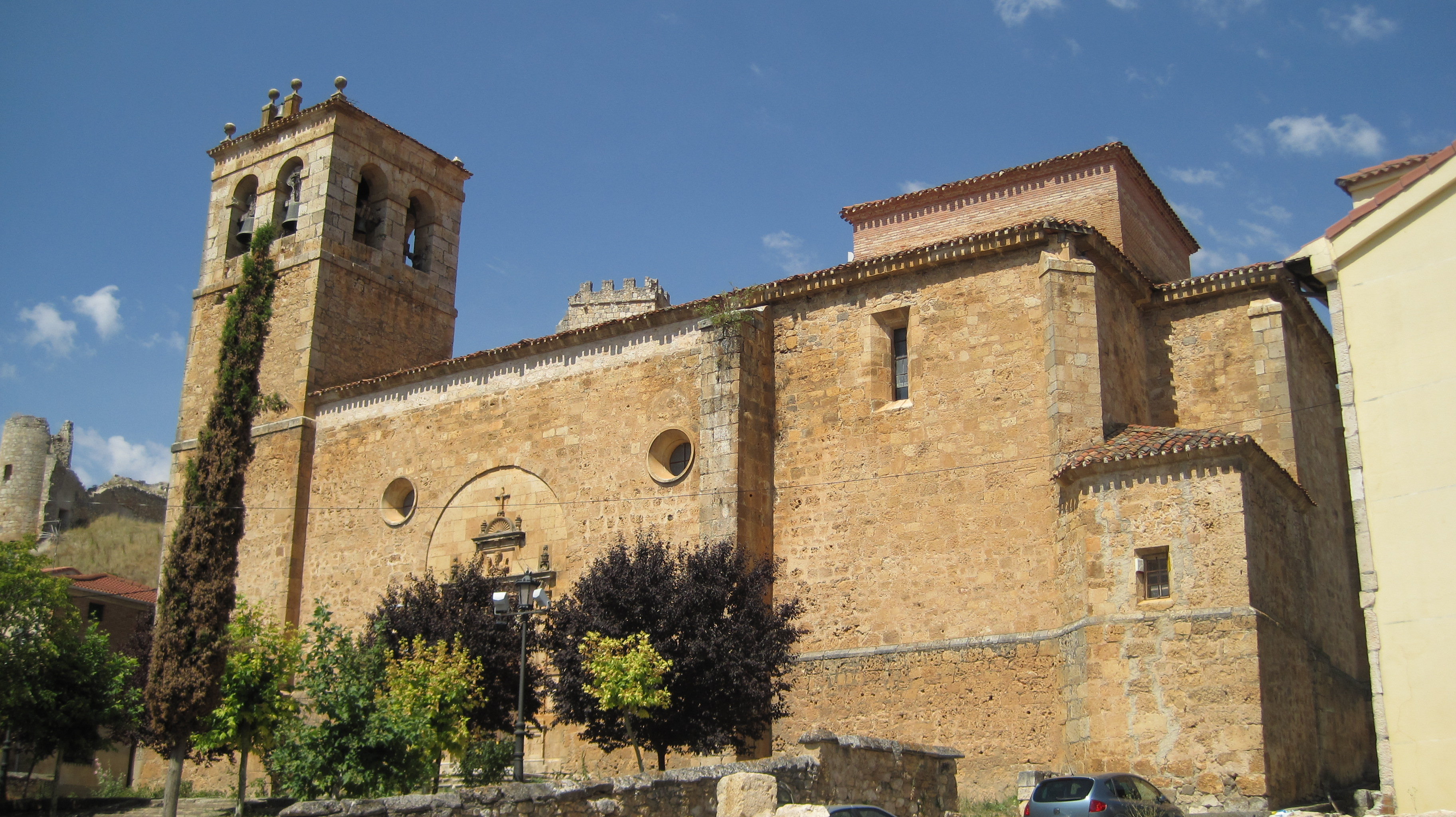 Iglesia de San Martín de Tours, en Coruña del Conde (Burgos, España).